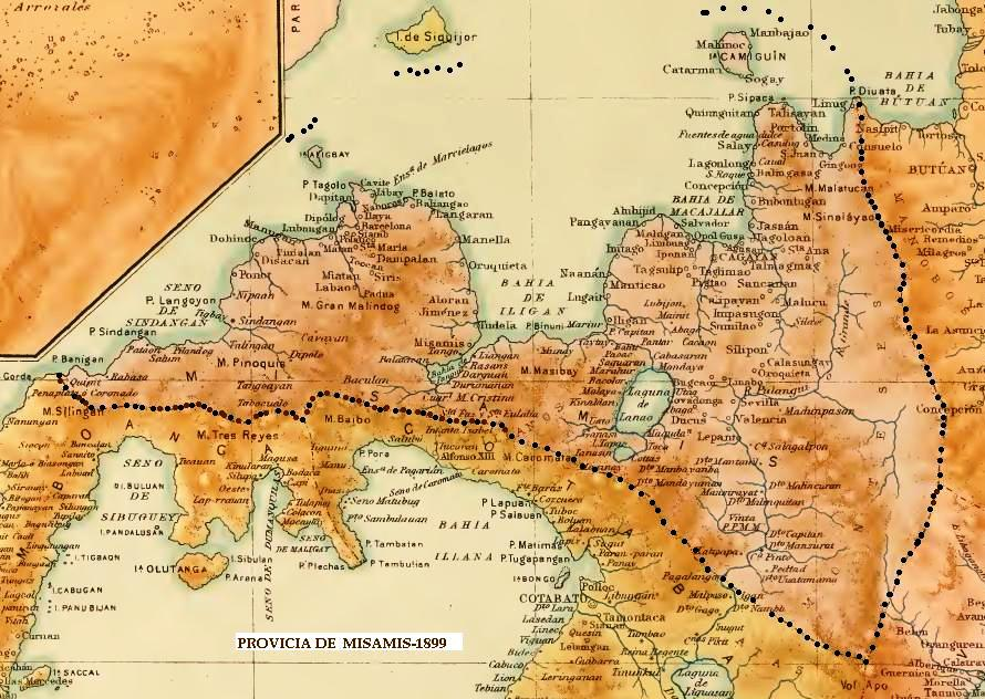 Fragmento del mapa de la página 81 del Atlas